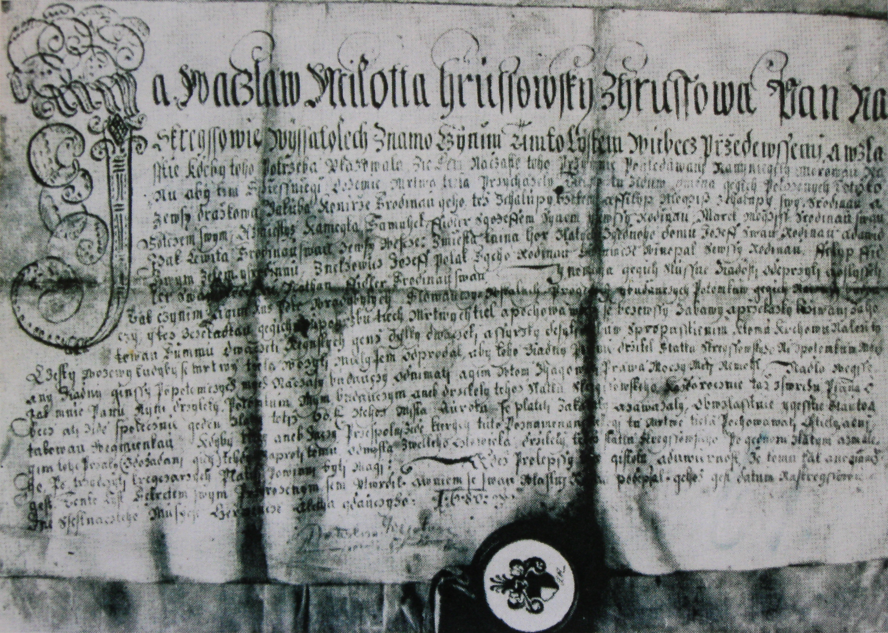 Listina z roku 1680, týkající se založení židovského hřbitova na Radobýlu (zdroj je stará fotografie, resp. otisk štočku)